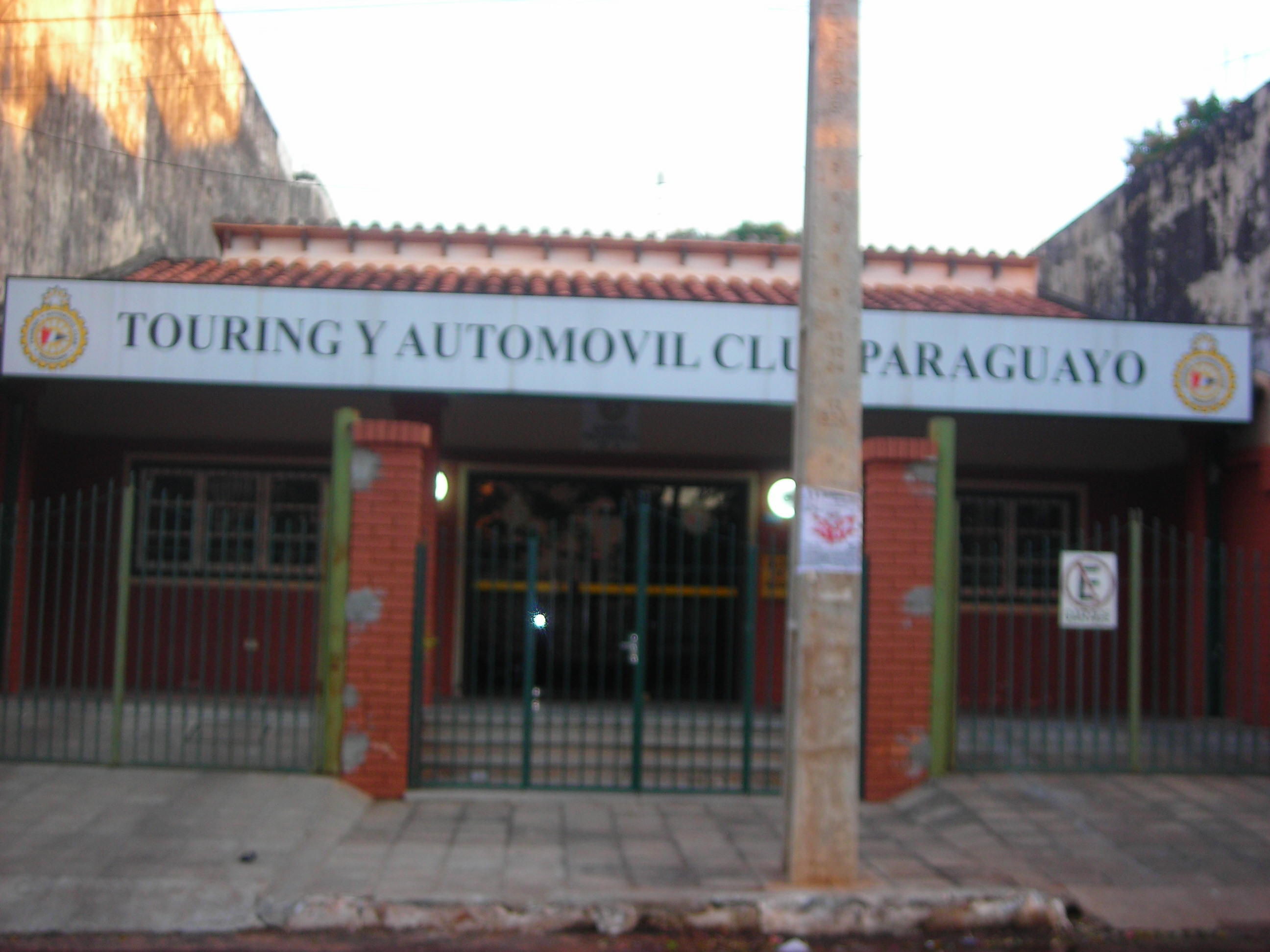 Touring